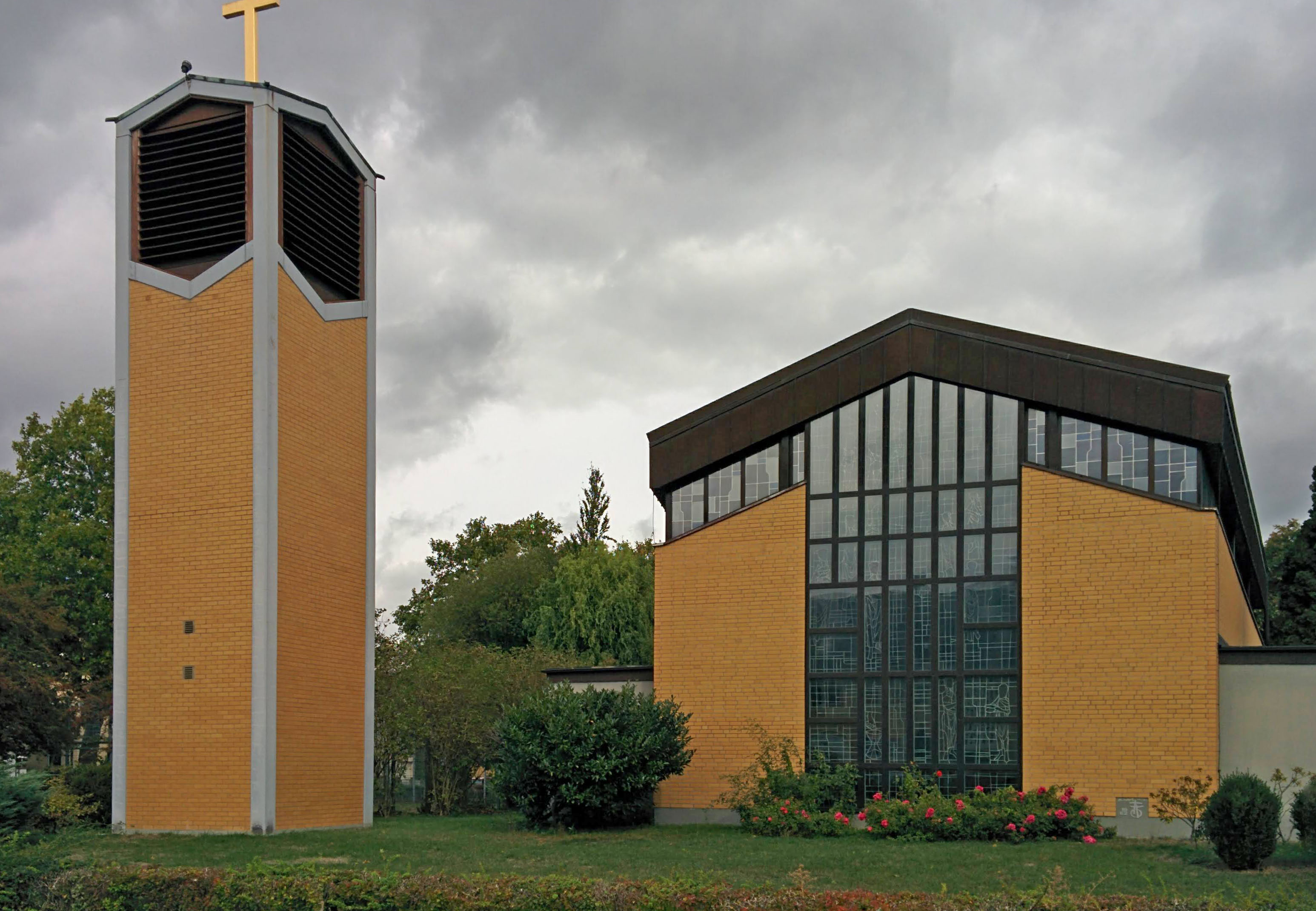 Hl. Familie (Emmerthal) am 22. September 2018